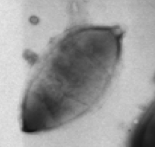 Image en microscopie électronique d'une bactérie membre appartenant au phylum Synergistetes.